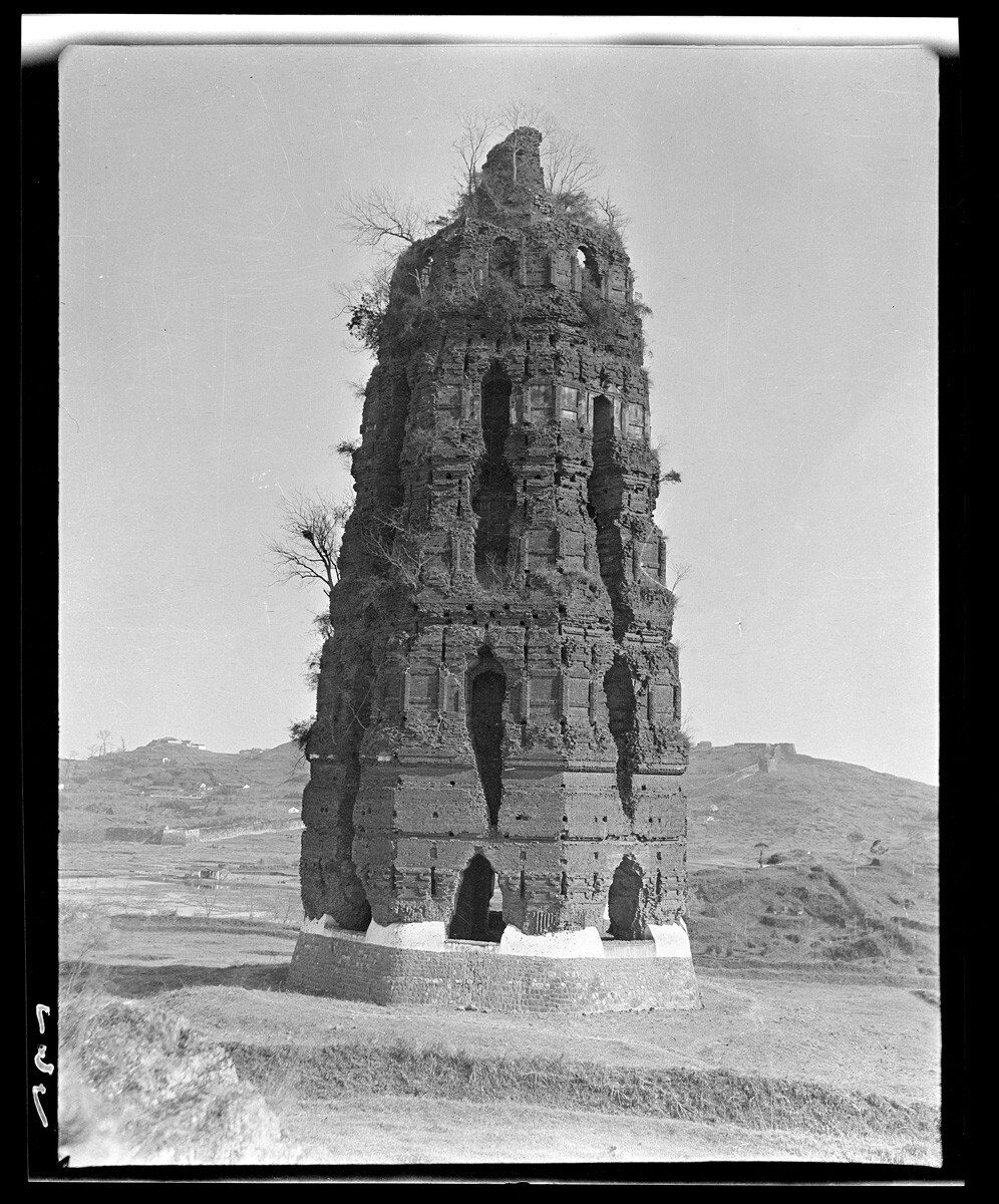 倒塌前的古雷峰塔，1919年拍摄。